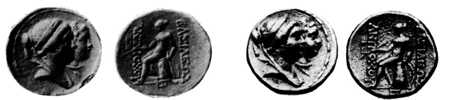 Octadrachmes d'or représentant d'un côté Laodicé IV avec son fils Antiochos et au revers le symbole des Séleucides : Apollon assis avec son arc et ses flèches Source : Le Rider Georges. "L'enfant-roi Antiochos et la reine Laodice". In: Bulletin de correspondance hellénique. Volume 110, livraison 1, 1986. pp. 409-417.